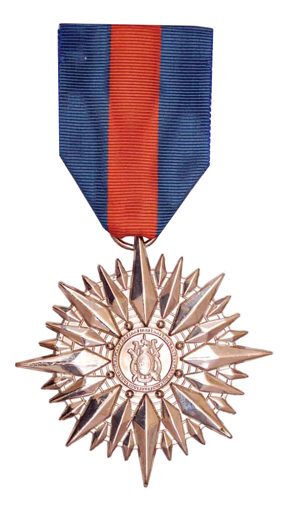 Condecoración Estrella de Carabobo